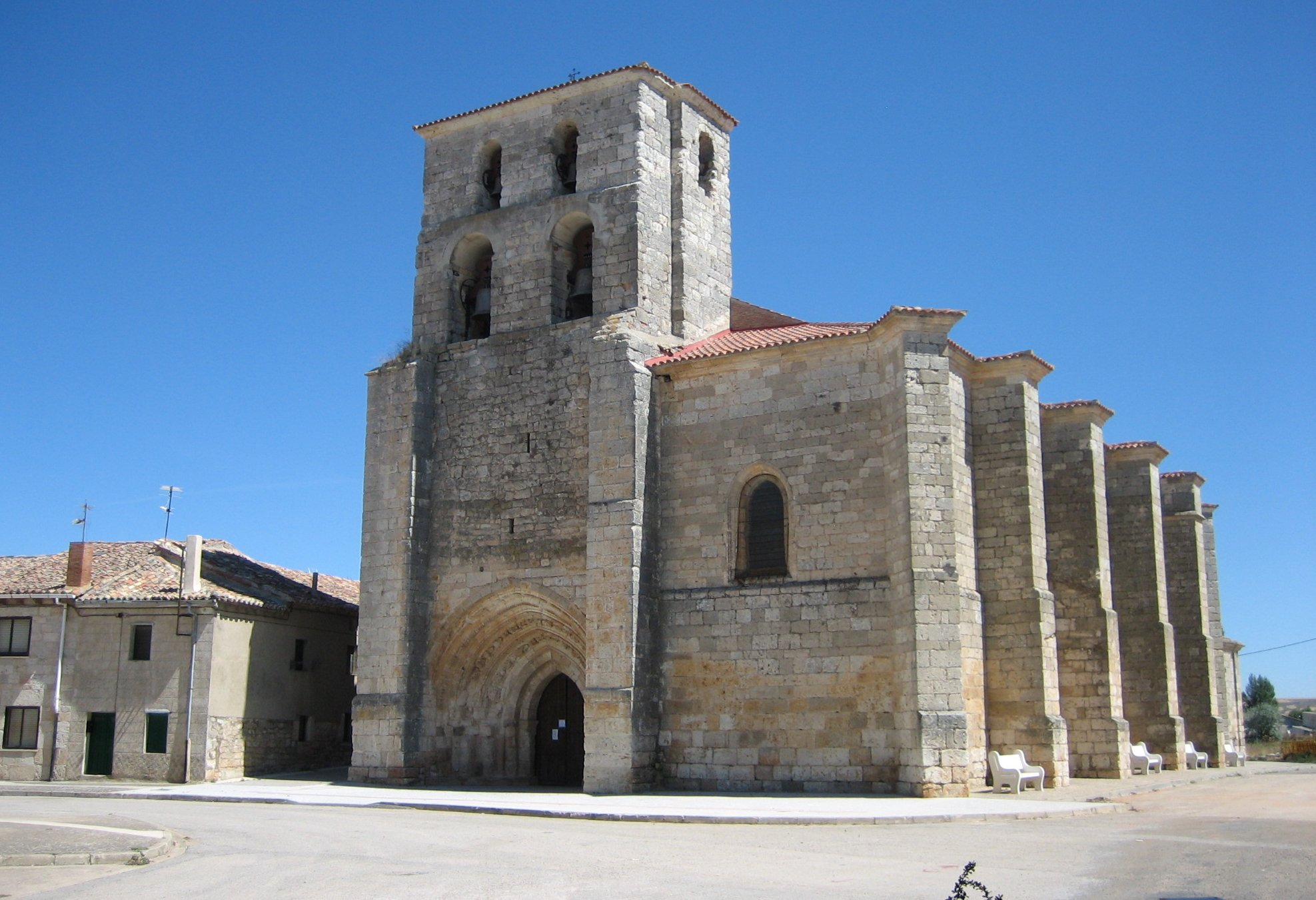 Plaza e Iglesia de Santa María, Villadiego, Burgos.